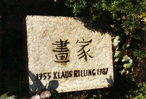 Grabmal von Klaus Rilling mit chinesischen Schriftzeichen für "Der Mahler"